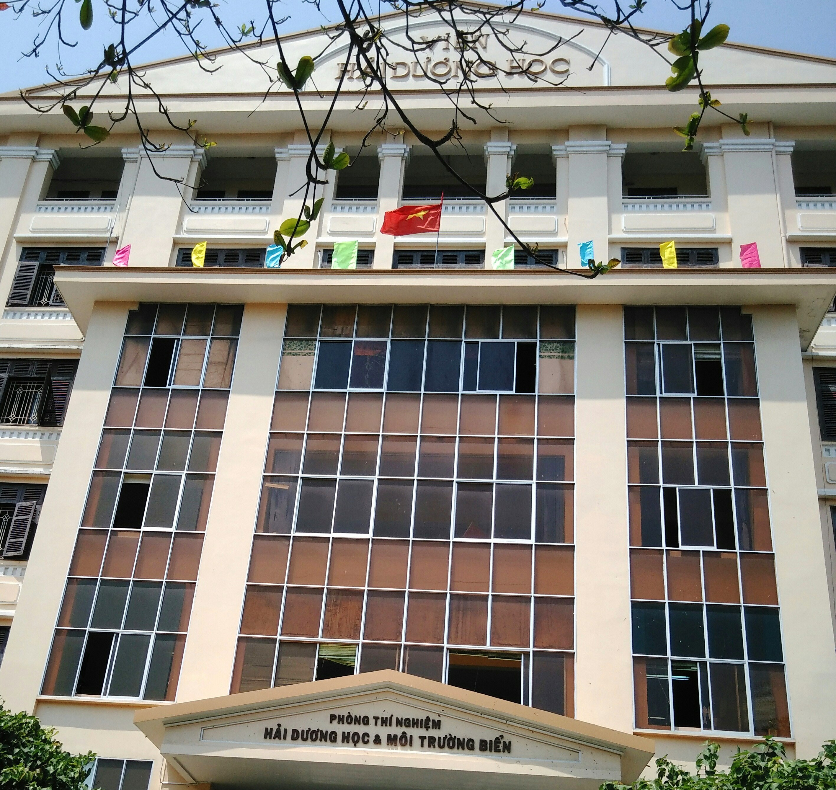 Viện Hải dương học - Phòng thí nghiệm đại dương